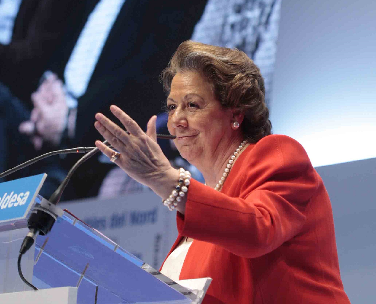 Alcaldesa de Valencia